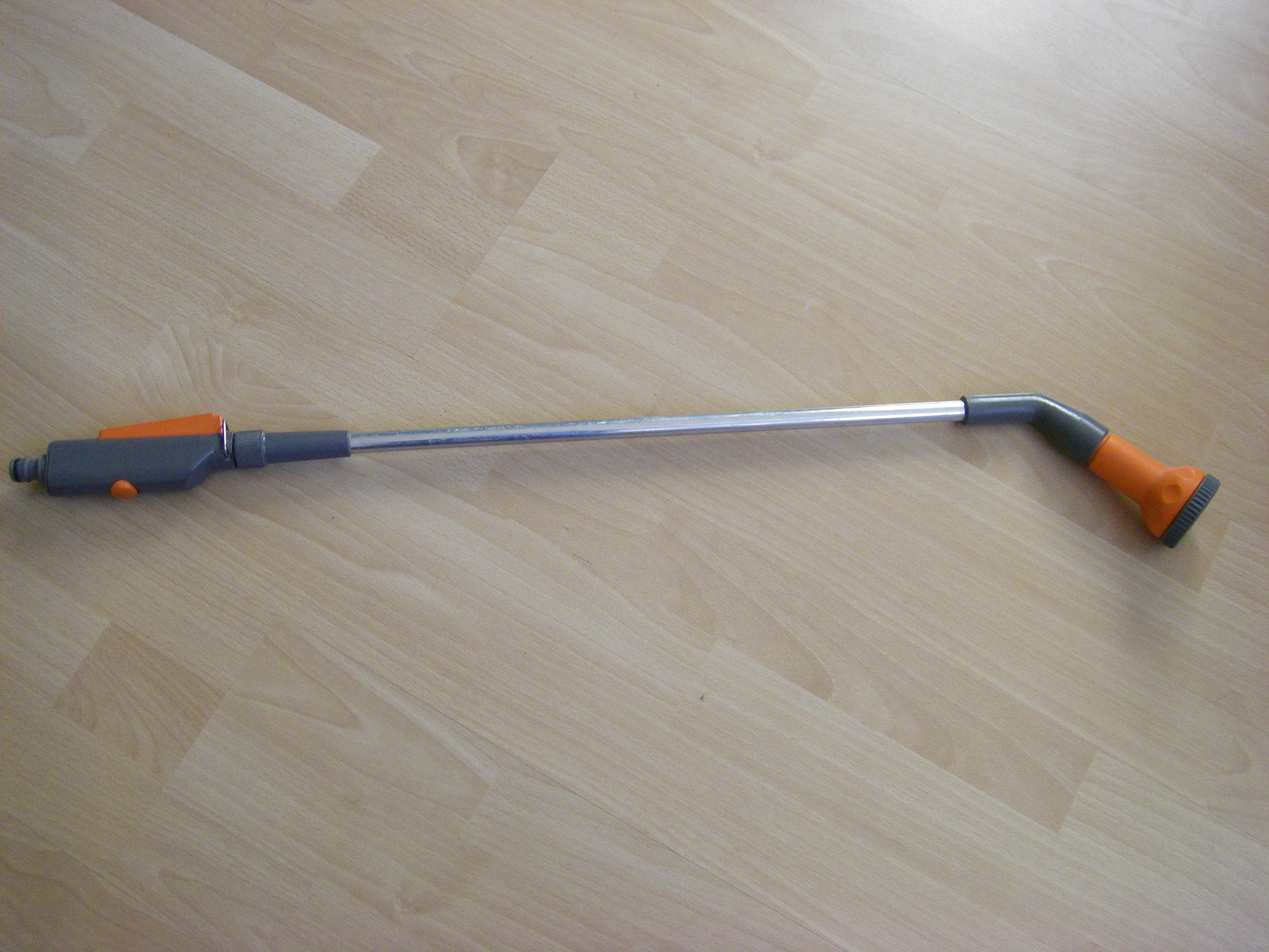 Ein handelsüblicher Gießstab